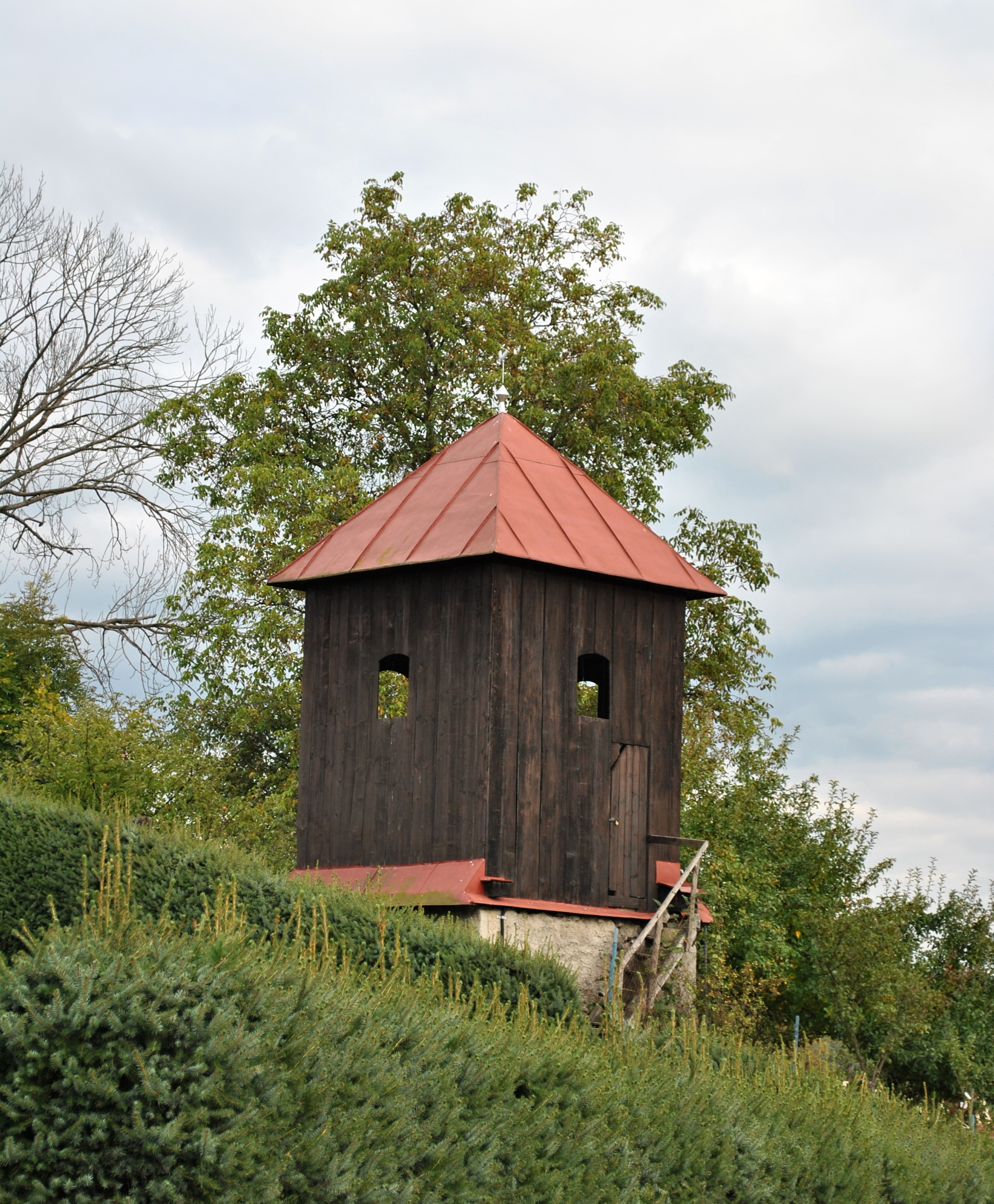 Zvonica drevená